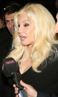 Susana Giménez y Mauricio Macri en la avant premiere del reestreno de La Mary